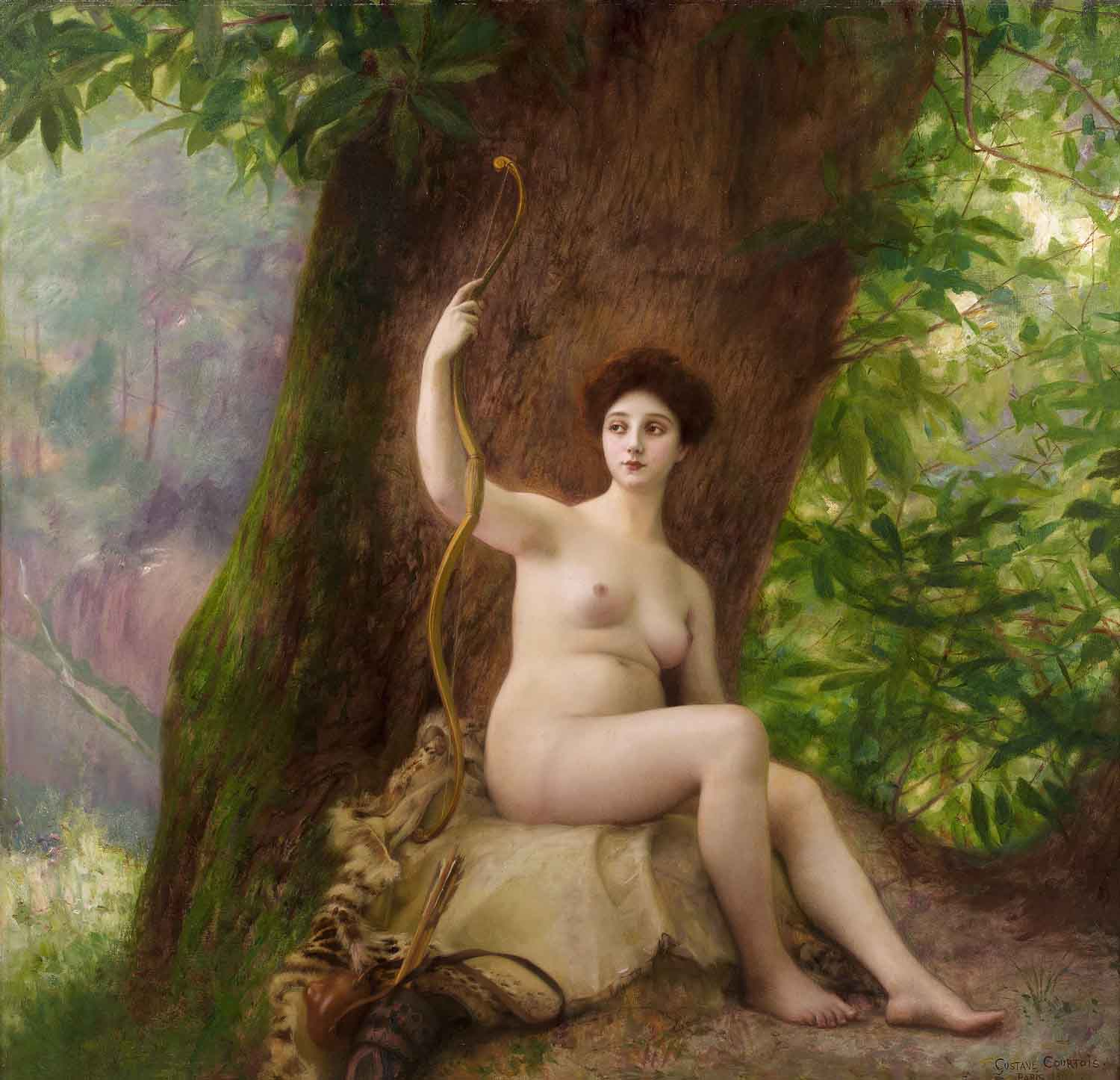 Woman as Diana in nature